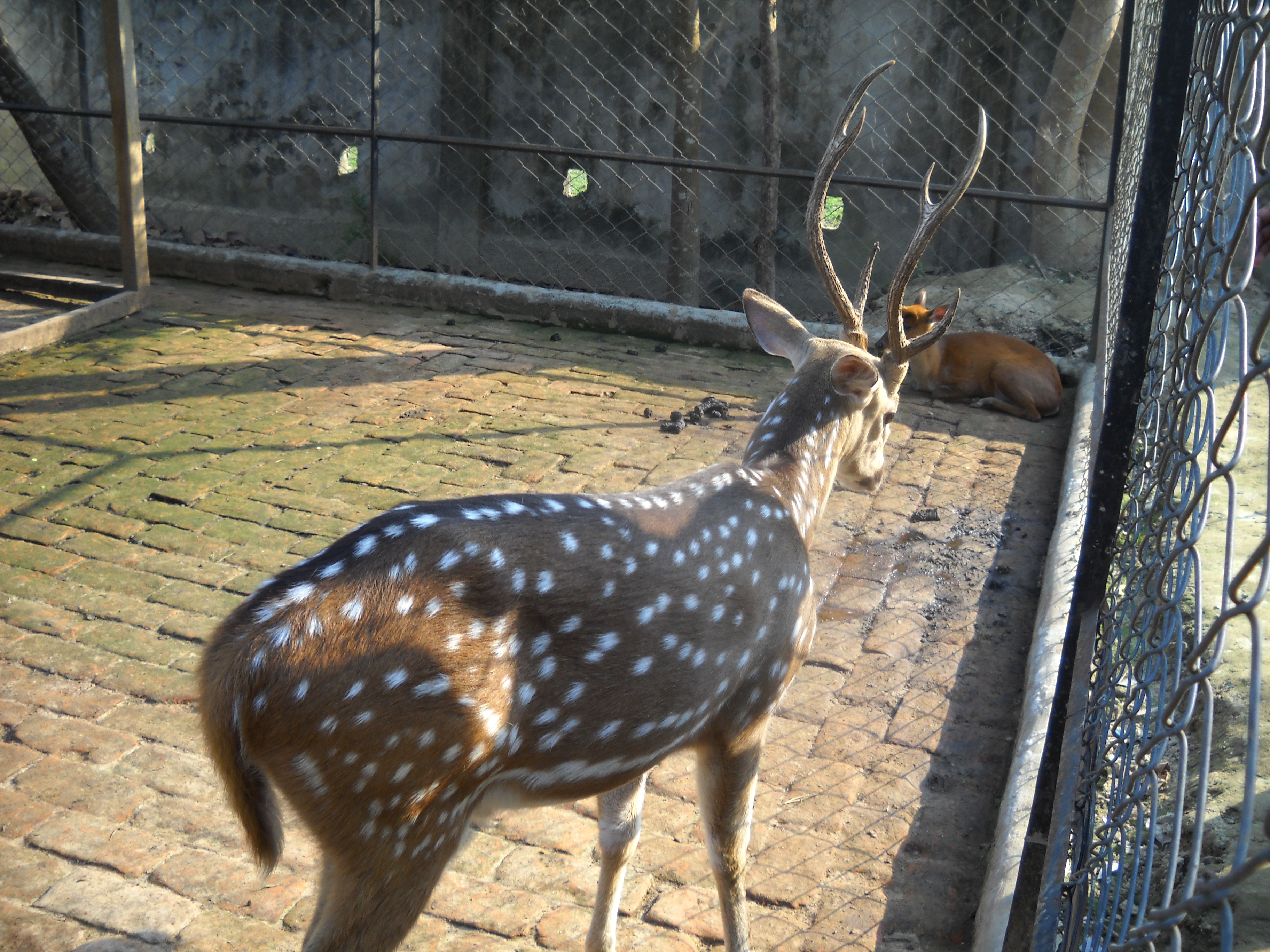 সিতেশ বাবুর চিড়িয়াখানায় মায়া হরিণ।